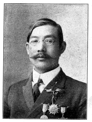 中文（台灣）: 中華民國國會議員